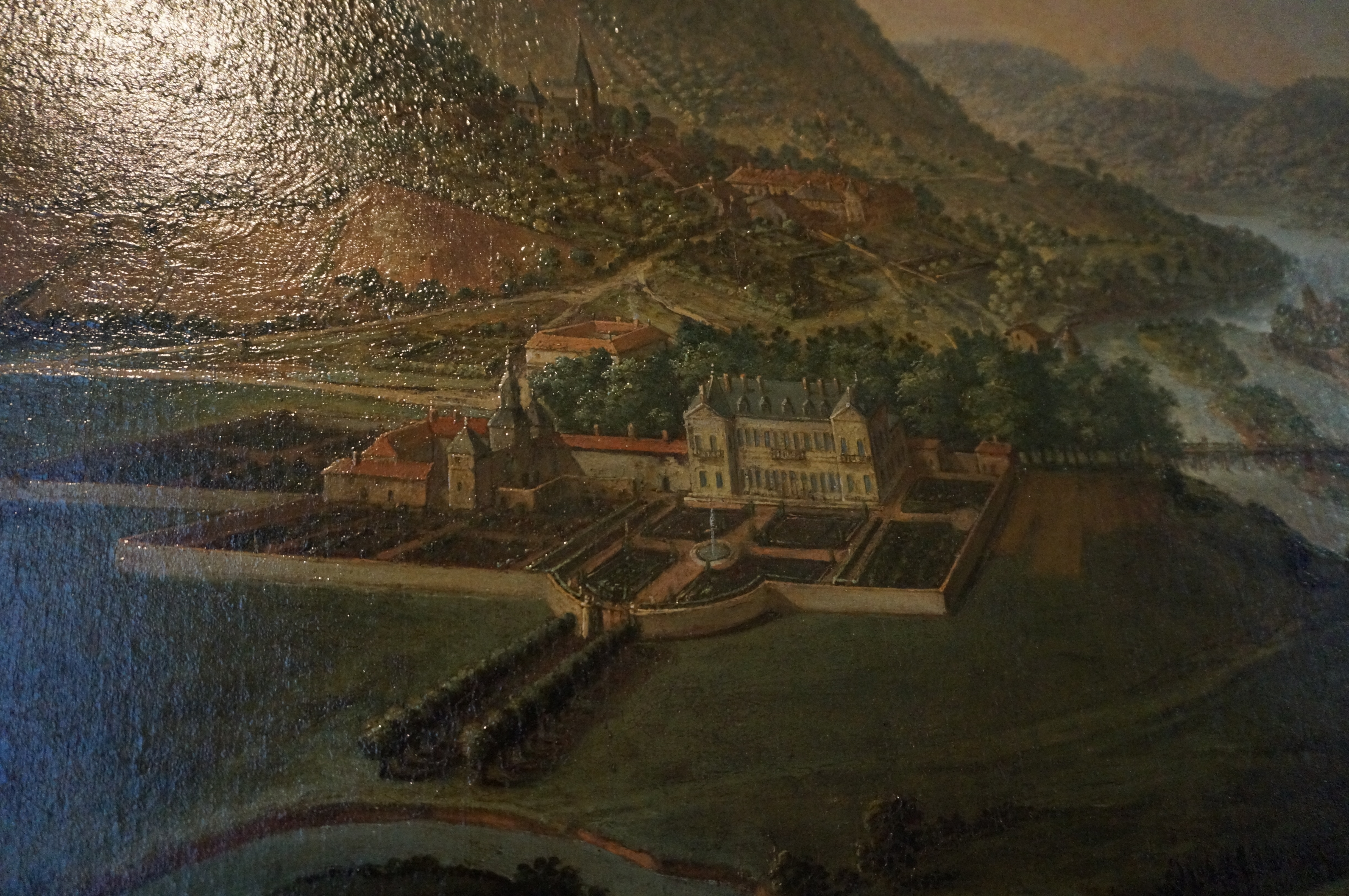 école française au Musée Lorrain.